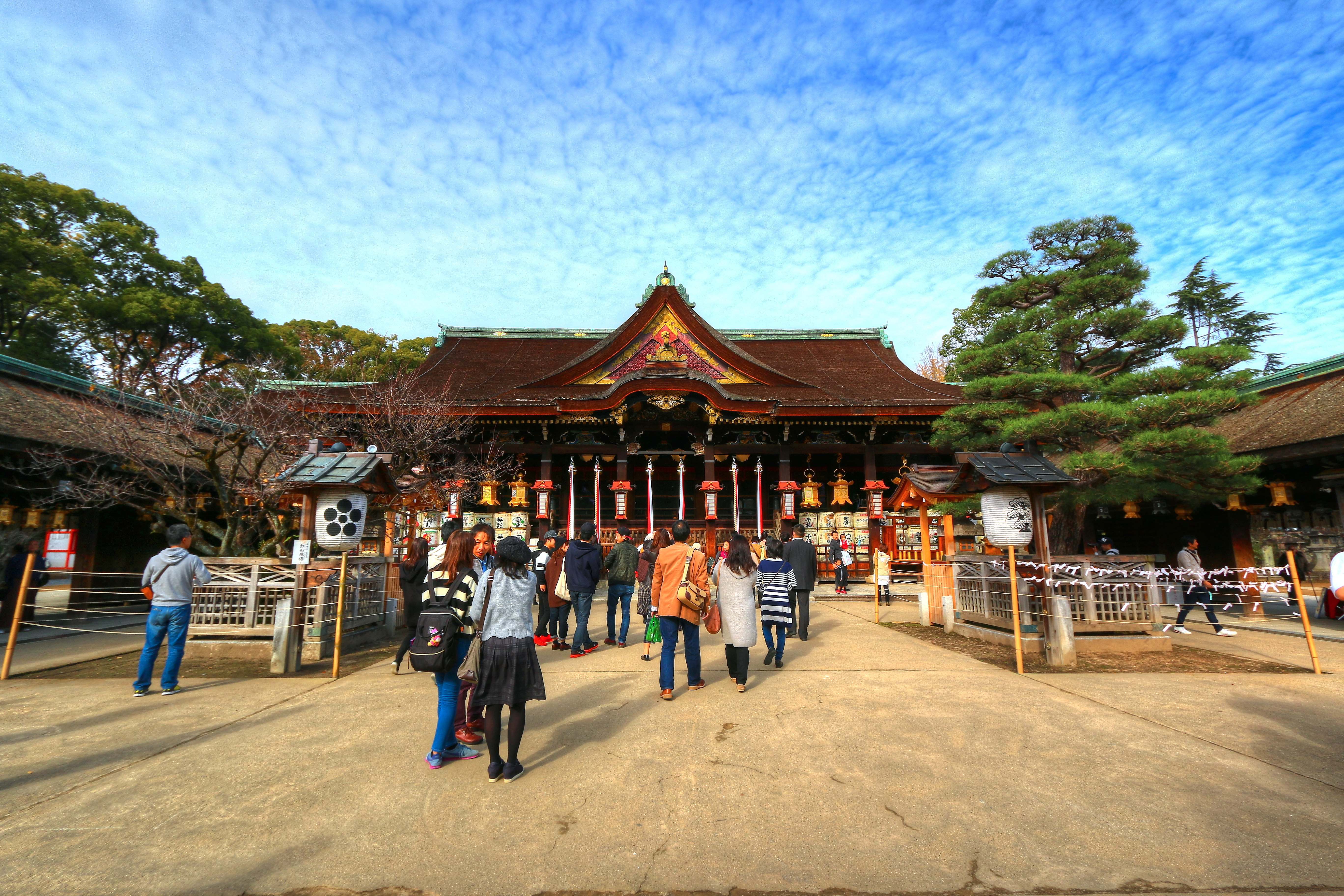 北野天満宮